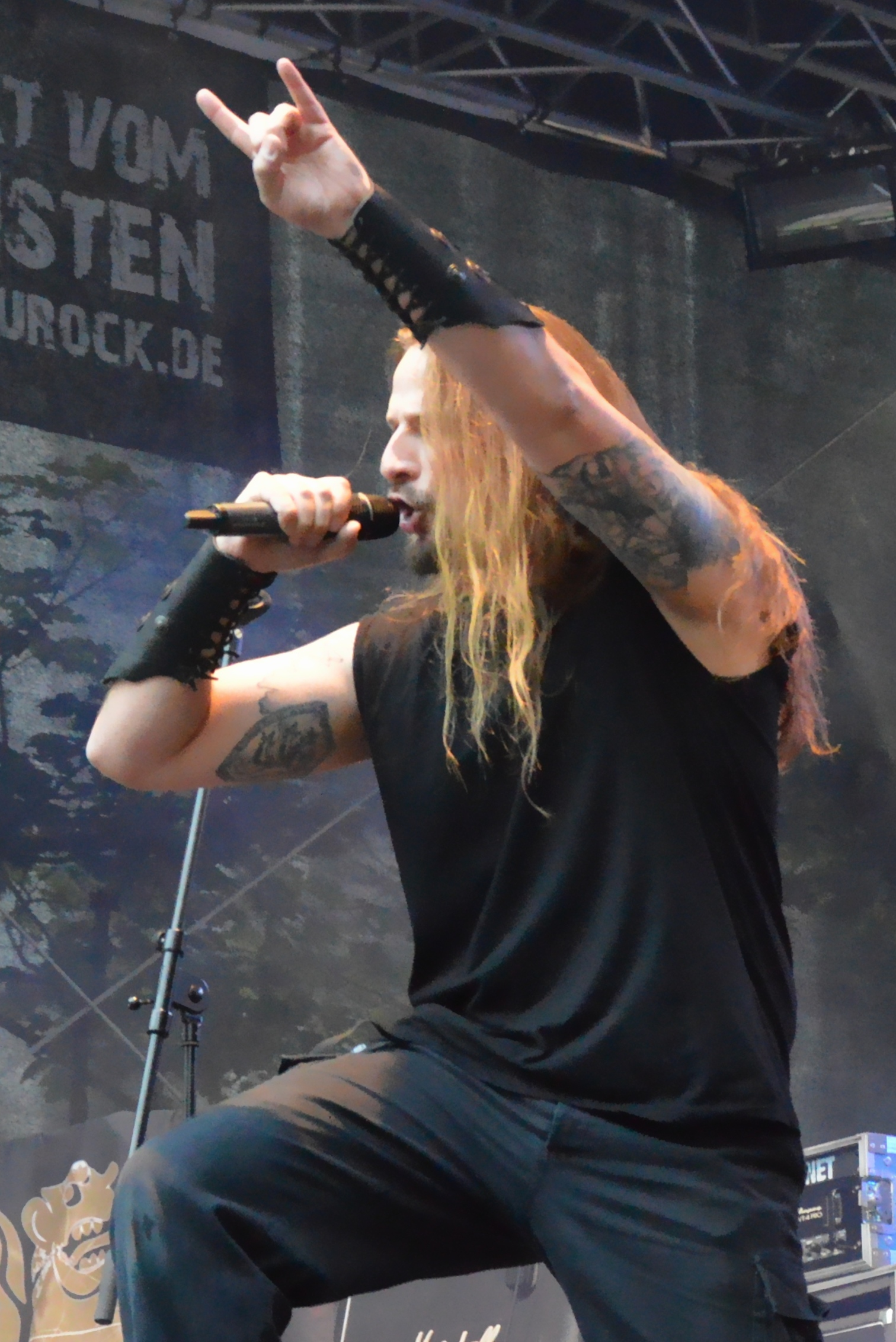 Obscurity beim Turock Open Air 2013 in Essen